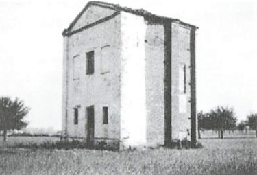 Madonna del Buontempo, Ceresole d'Alba (foto d'epoca)